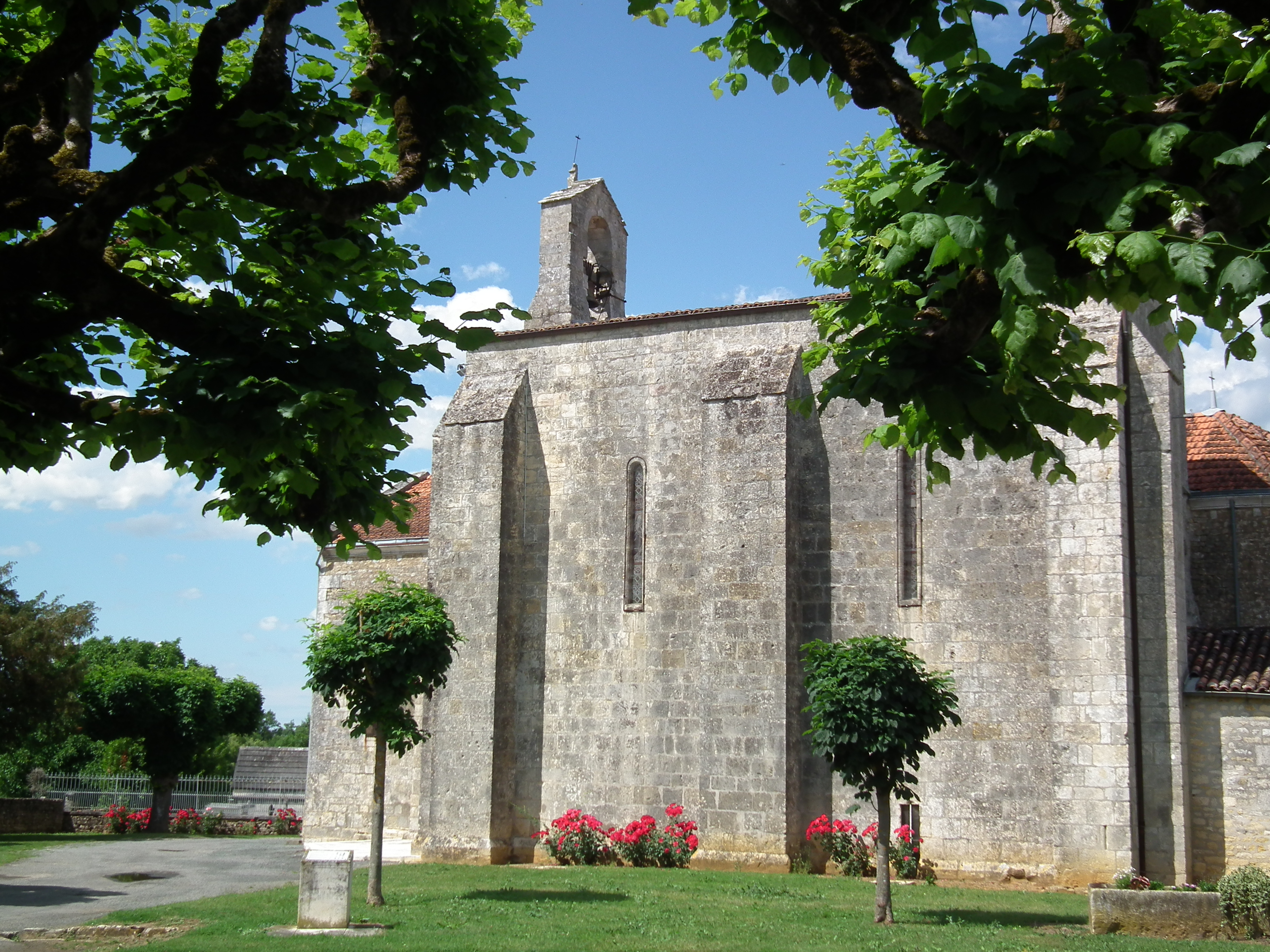 L'église de Saint-André-de-Lidon